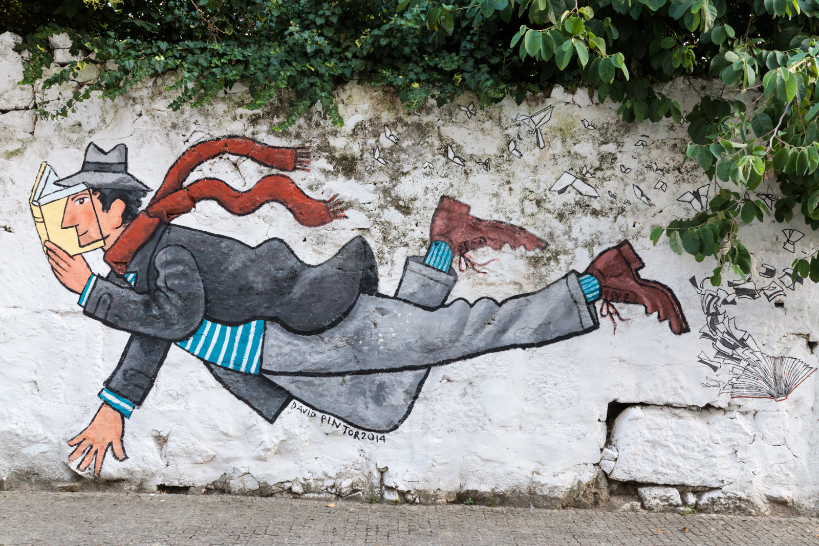 OPO - 20150910 - 113